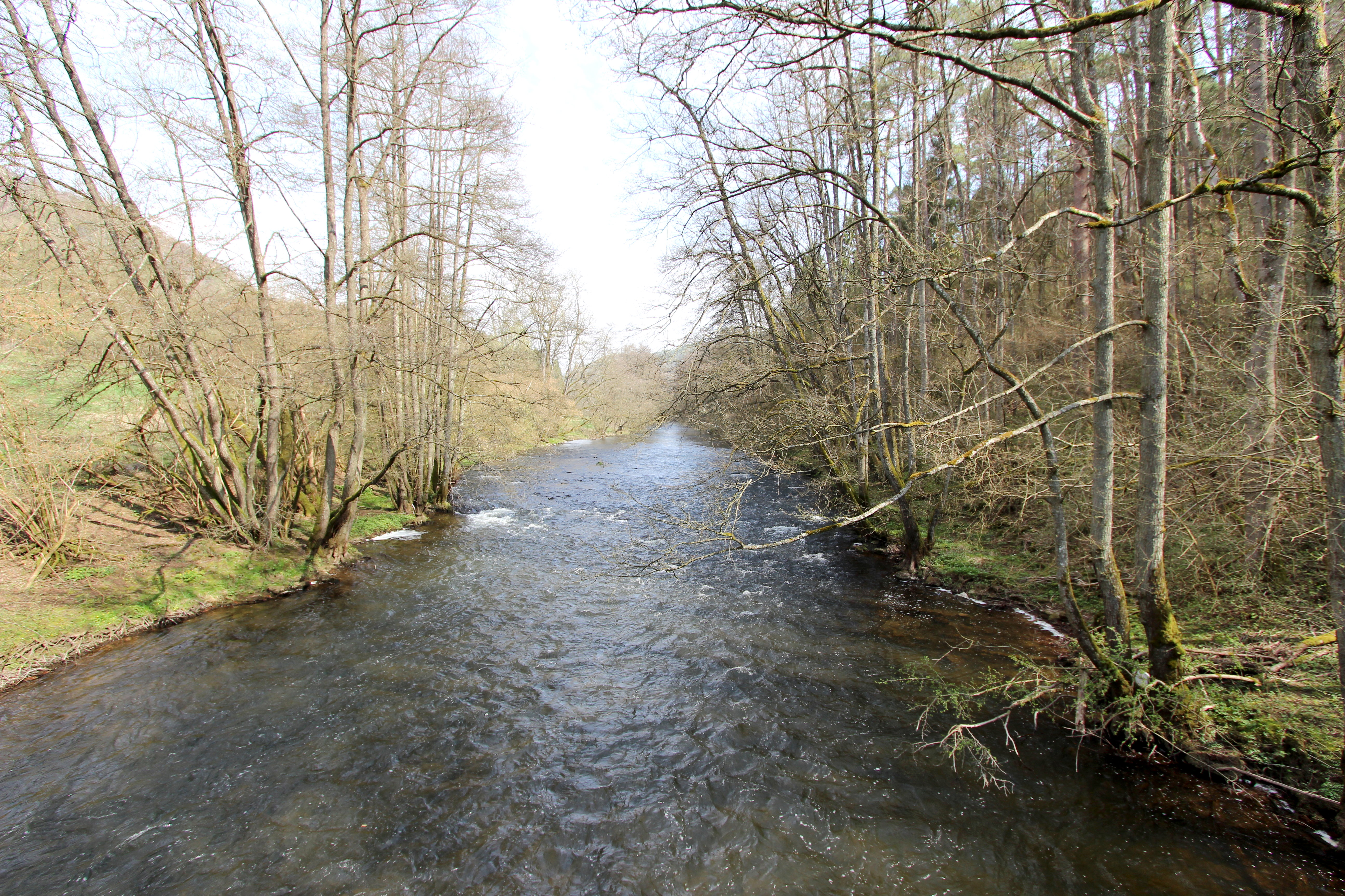 54634 Erdorf, südlich des Ortes. Aufnahme von 2018.